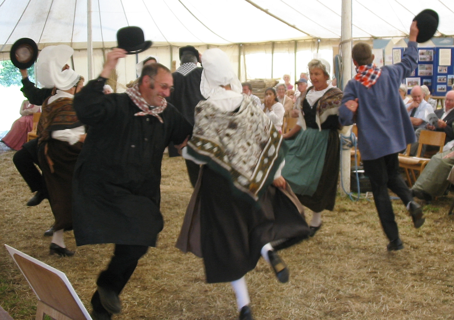 Norman traditions at La Fête des Rouaisouns in Guernsey, June 2006. Quettehou dancers perform Les Gars de Senneville